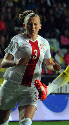 a_104_4130